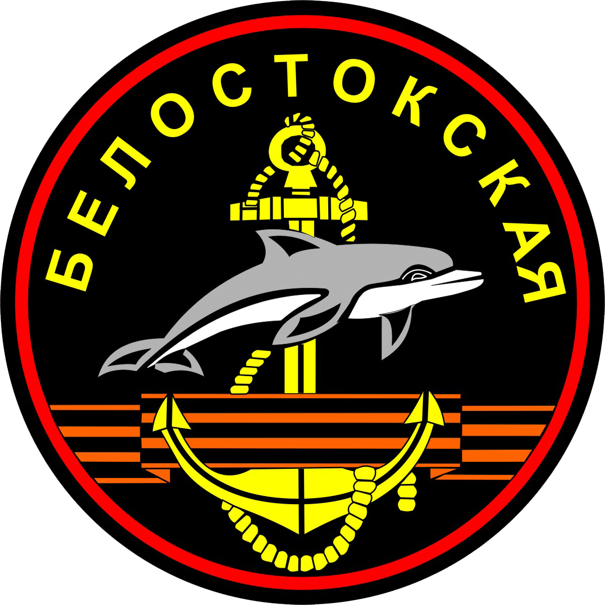 Эмблема 336-й отдельной гвардейской Белостокской бригады морской пехоты Дважды Краснознаменного Балтийского Флота.